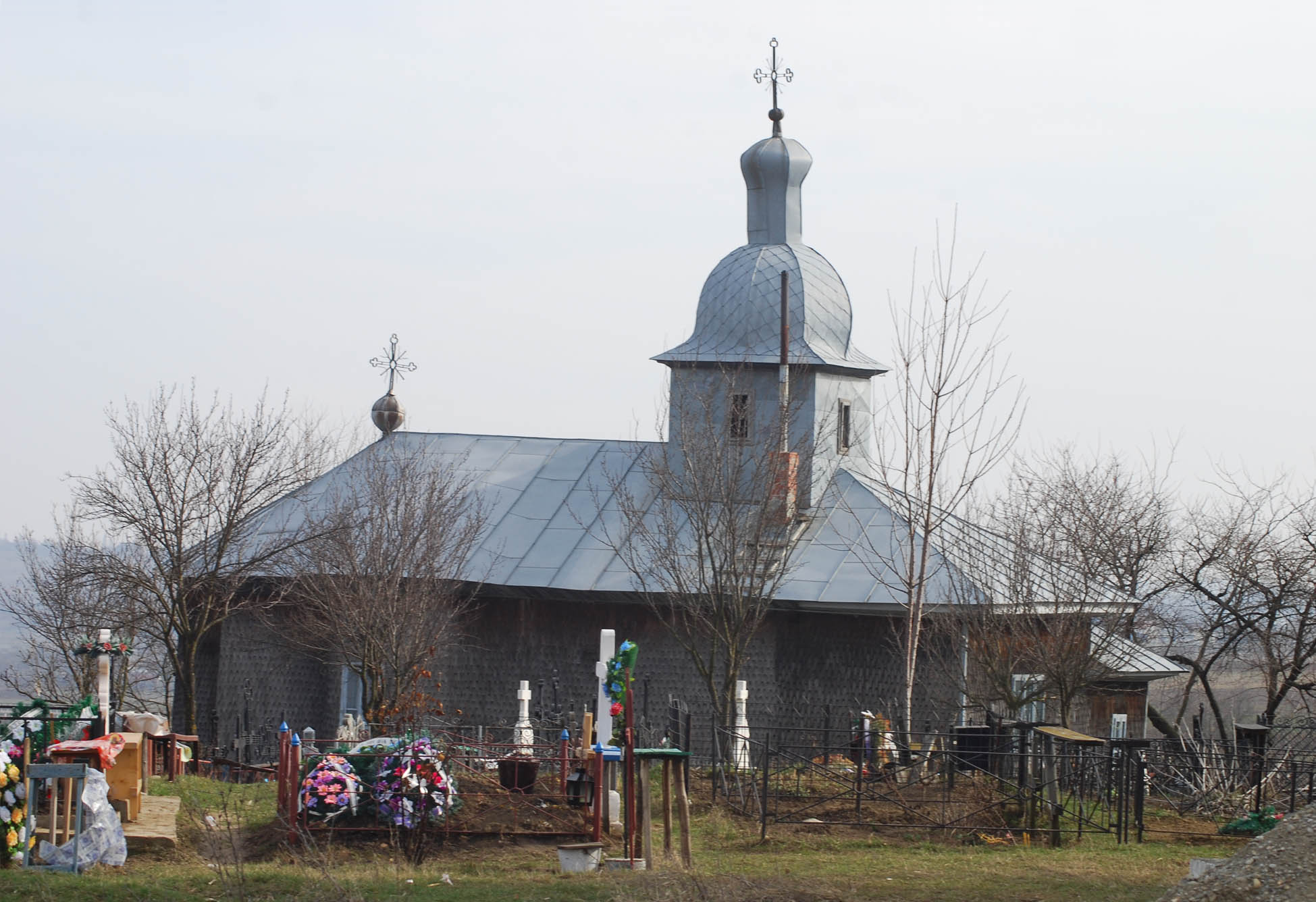 Biserica Sfinţii Voievozi din Rediu, Neamţ. Vedere de pe latura nordică.